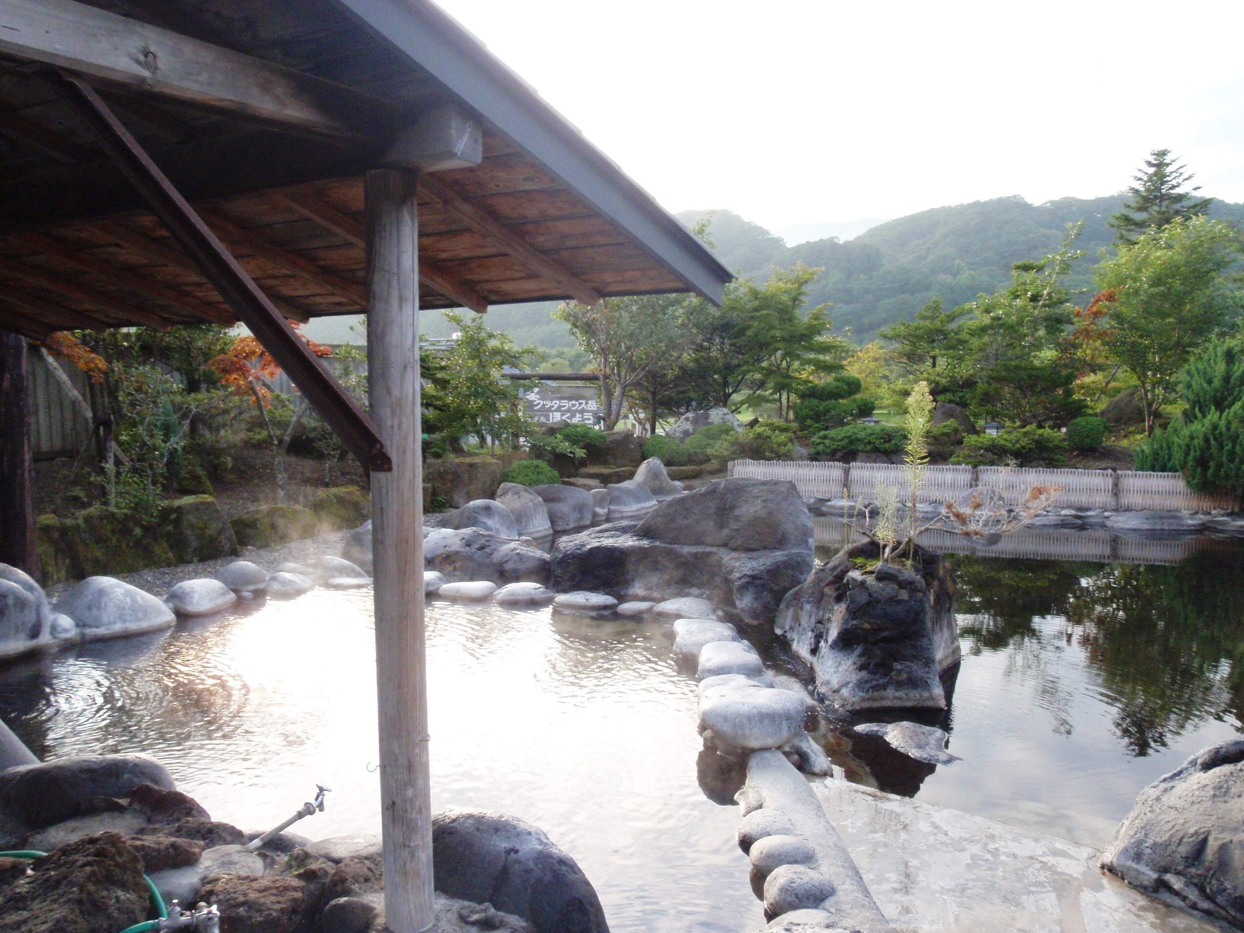 虎杖浜温泉、ほくよう、露天風呂